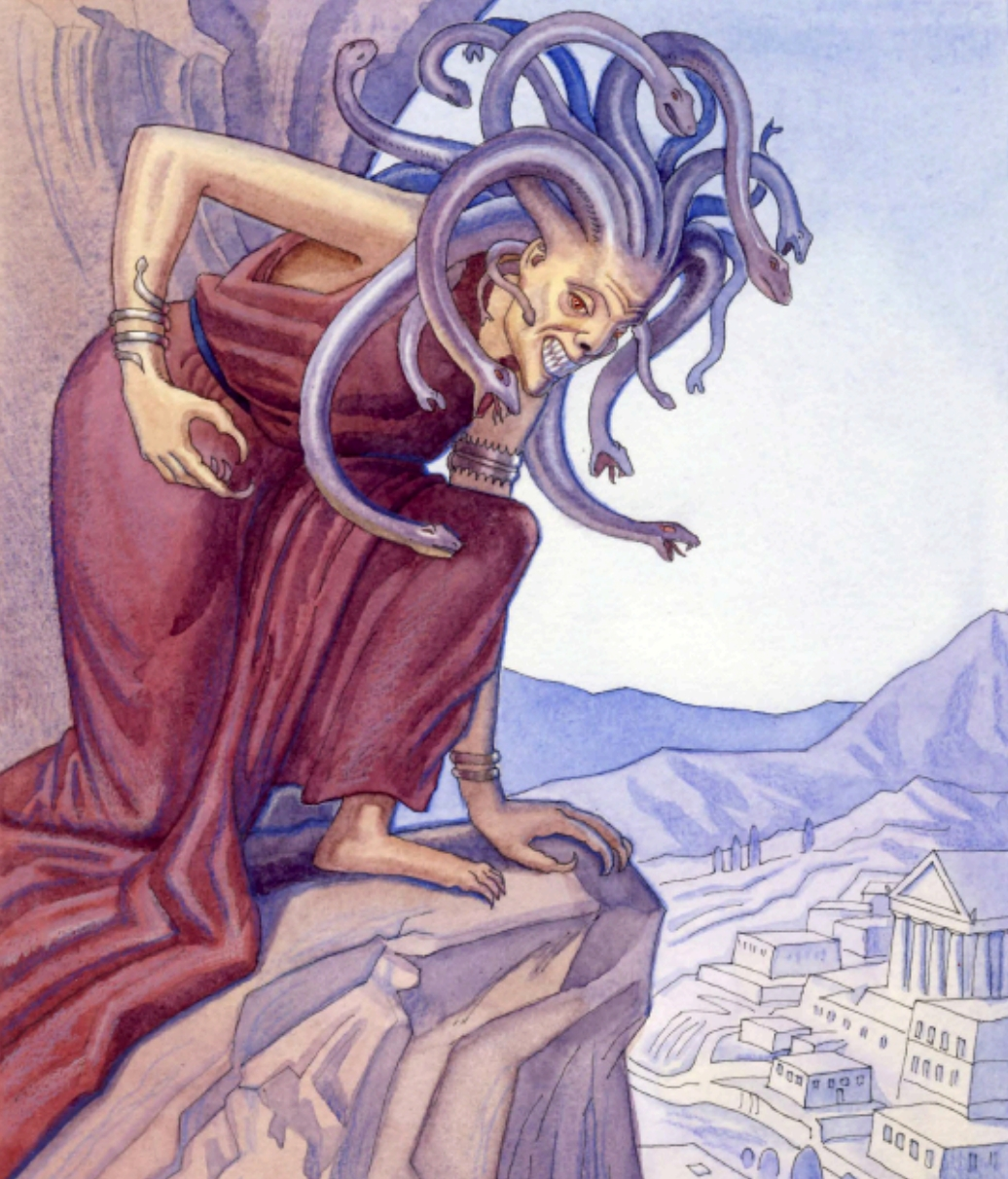 Тисифона